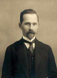 Lietuvos valstybės prezidentas Antanas Smetona. Nuotrauka daryta dar prieš I pasaulinį karą. Autorius – Vilniaus fotografas Aleksandras Jurašaitis (1859-1915). Antanas Smetona. One of the signatories of Lithuanian independence act. First President of Lithuania. Photo taken before IWW by photographer Aleksandras Jurašaitis (1859-1915) from Vilnius.